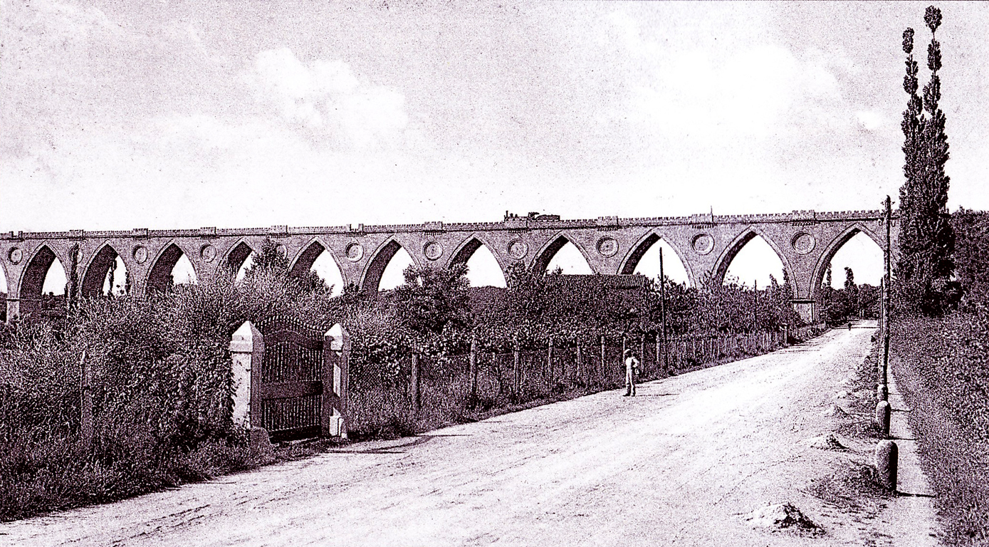 Il vecchio viadotto ferroviario di Desenzano, distrutto durante la II guerra mondiale.